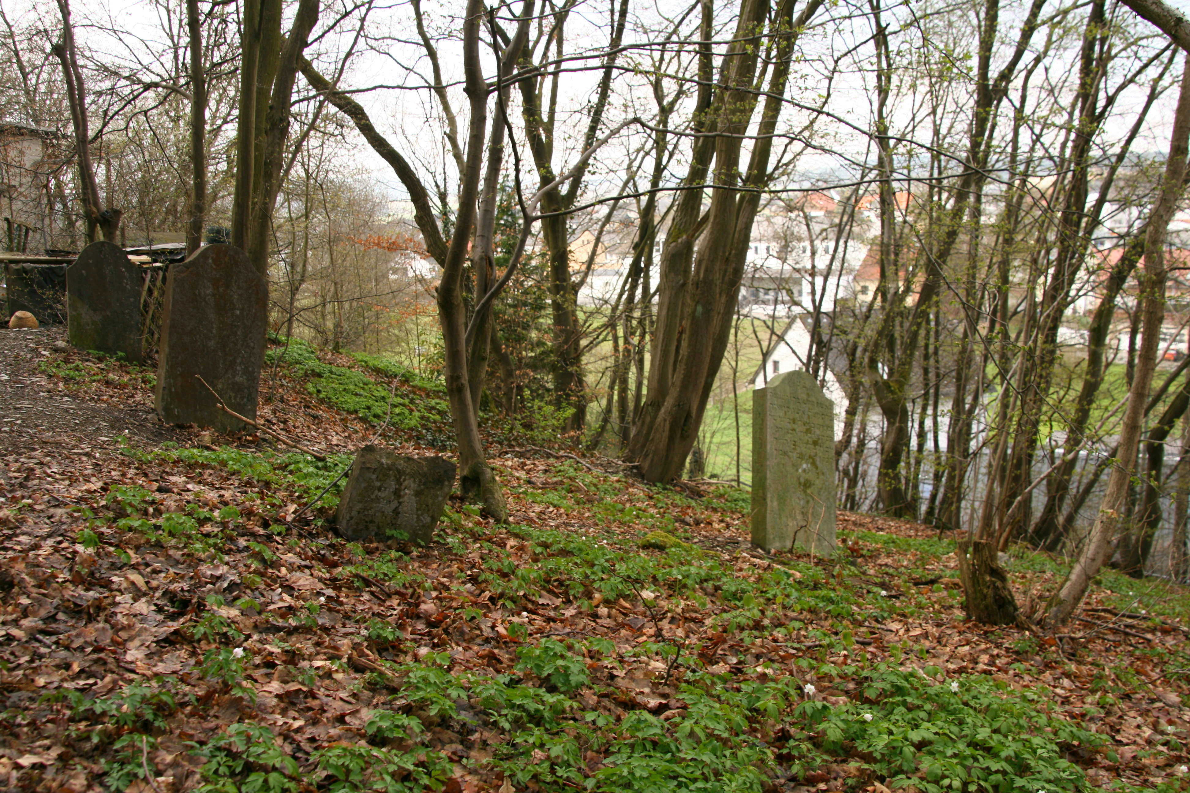 Jüdischer Friedhof Heidenrod-Laufenselden, Rheingau-Taunus-Kreis, Hessen